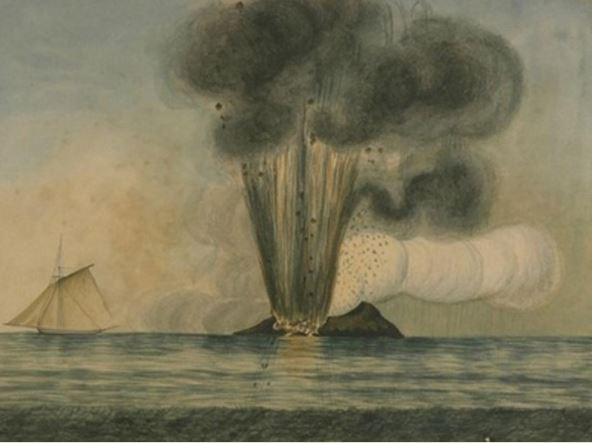 Isoal Ferdinandea stampa popolare